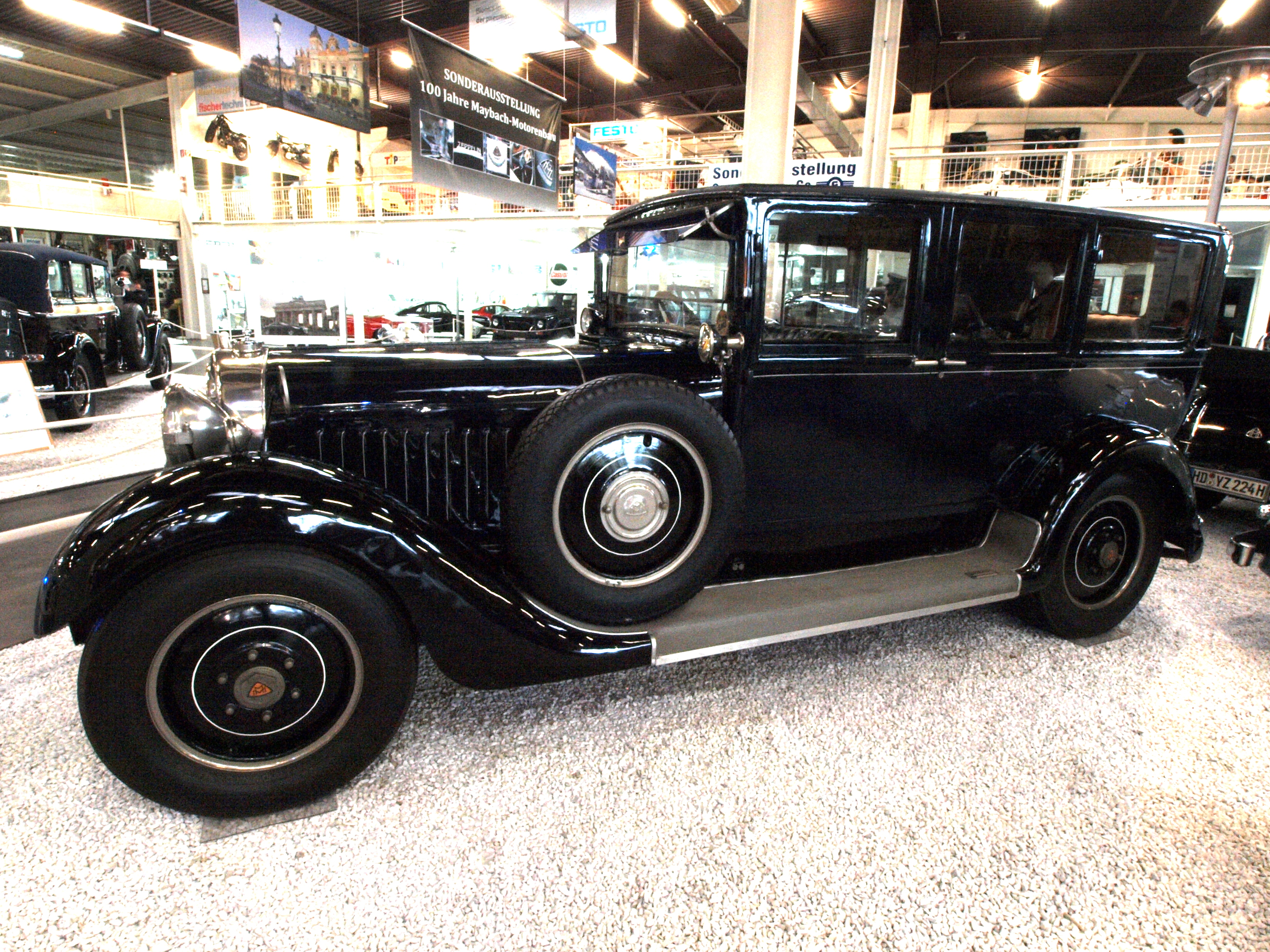 Maybach W 5 von 1926, 1928 auf SG (Schnellgang) umgebaut, im Auto- und Technikmuseum Sinsheim